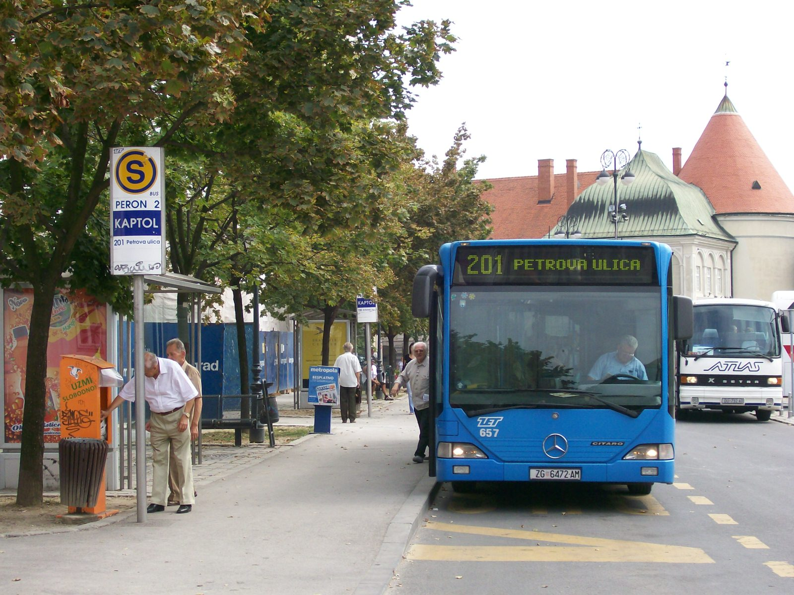 Autobus ZET-a linije 201 na početnom stajalištu Kaptol